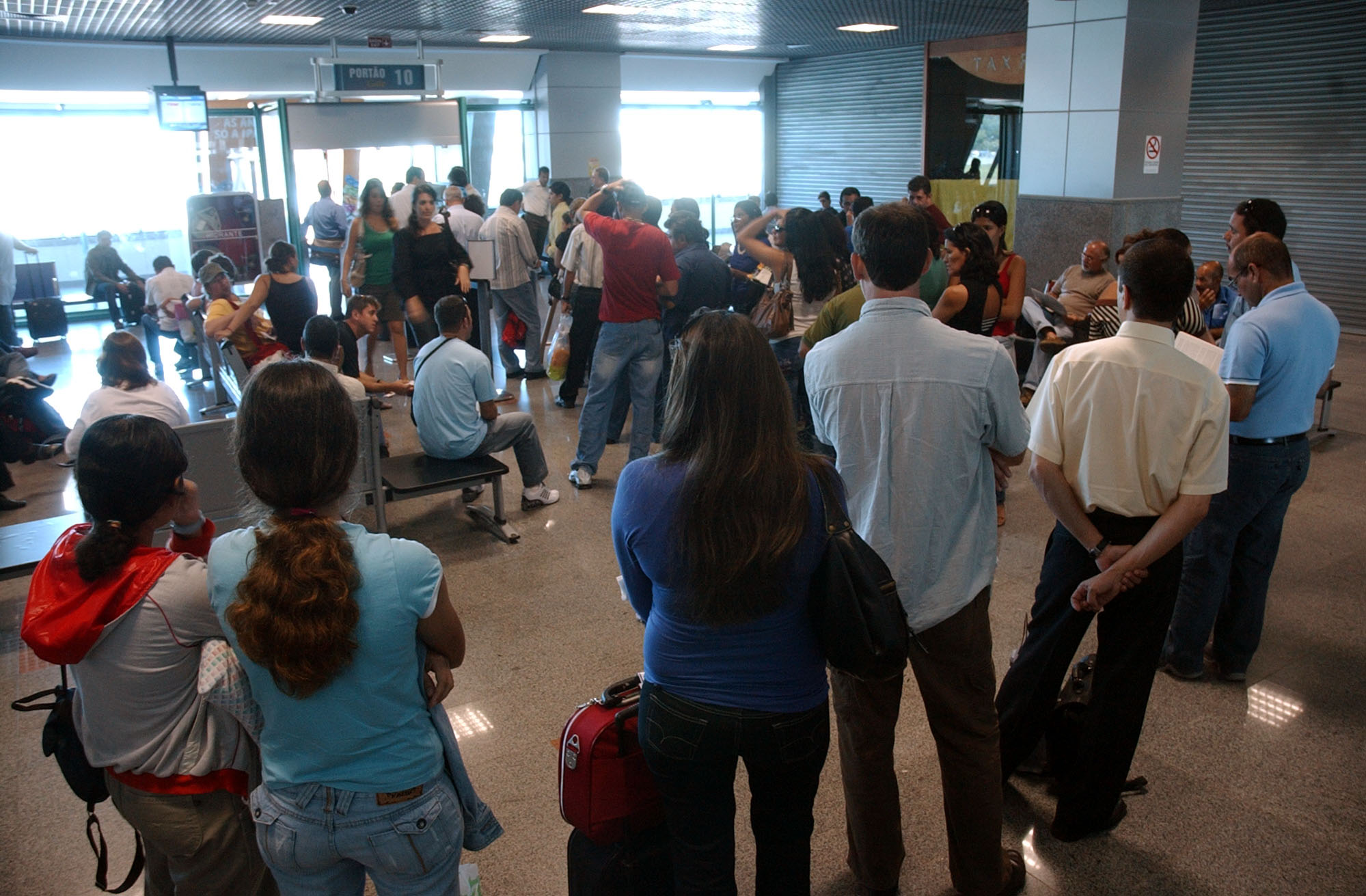 Salvador (BA) - Sala de embarque do Aeroporto Luiz Eduardo Magalhães, que também foi afetado pelos atrasos e cancelamentos de vôos que começaram no fim de semana.